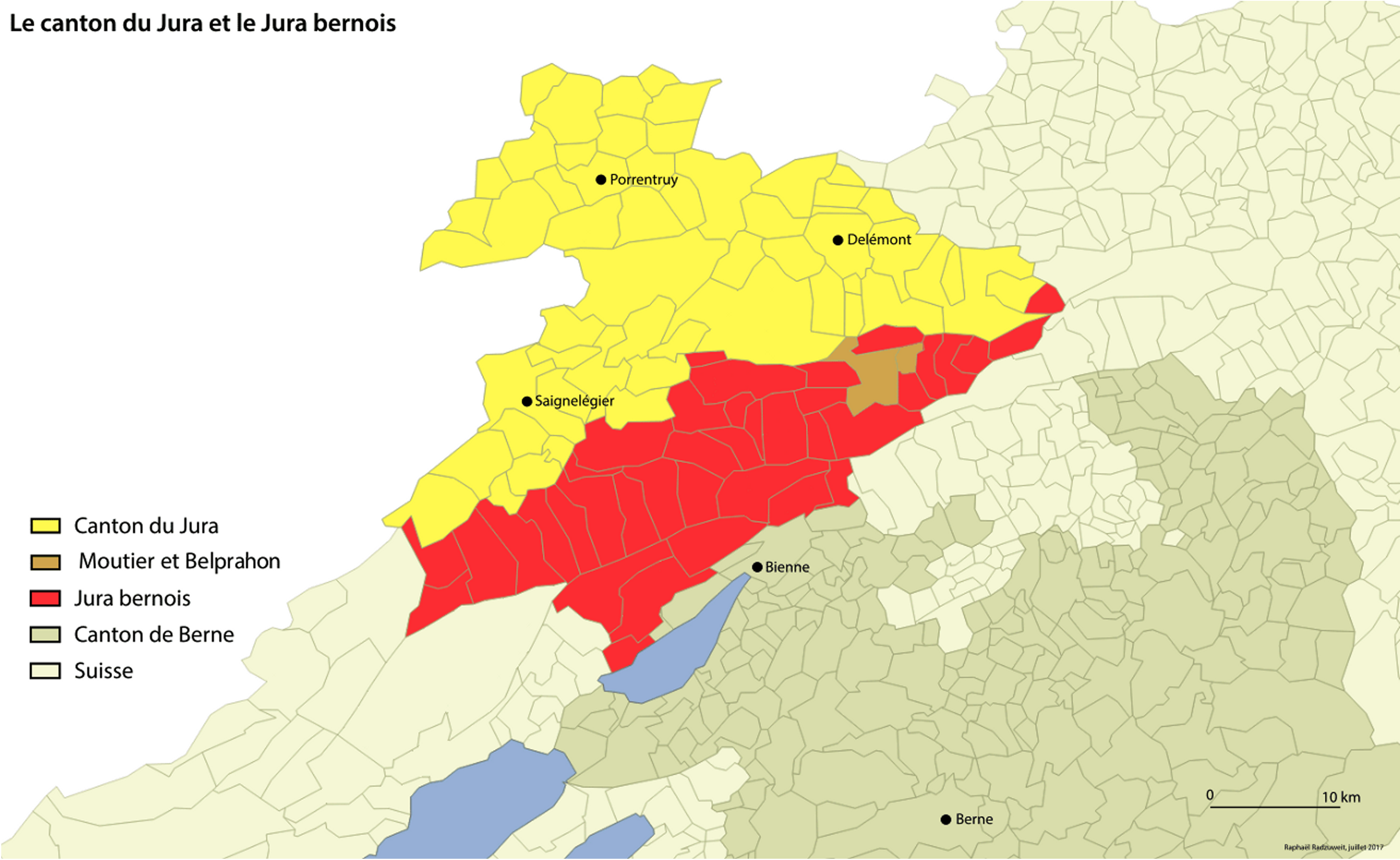 Carte du canton du Jura et du Jura bernois